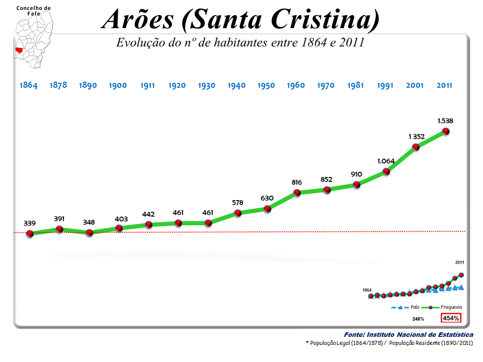 Censos 1864/2011